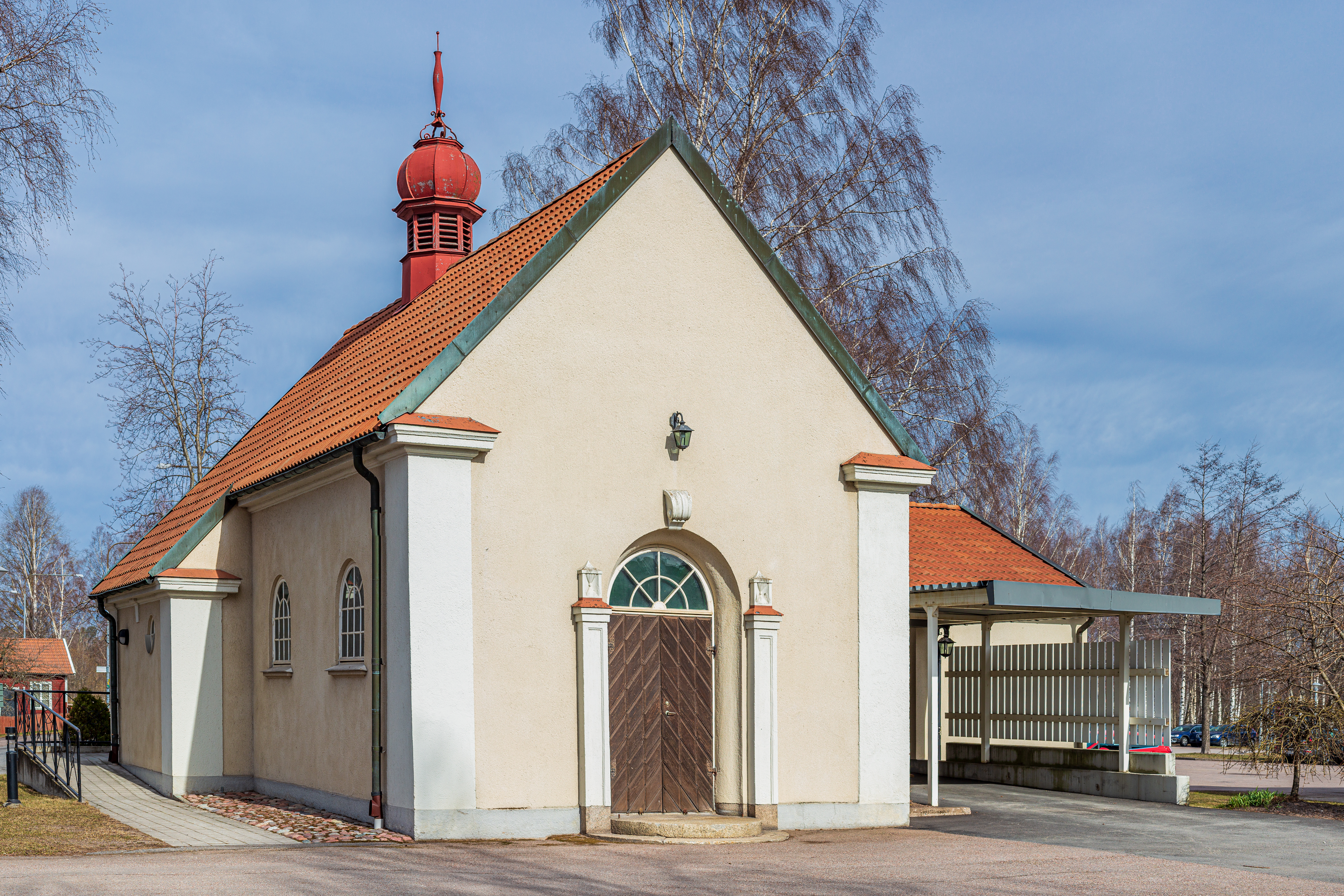 Avesta lasaretts gravkapell. Avesta, Dalarnas län, Sverige